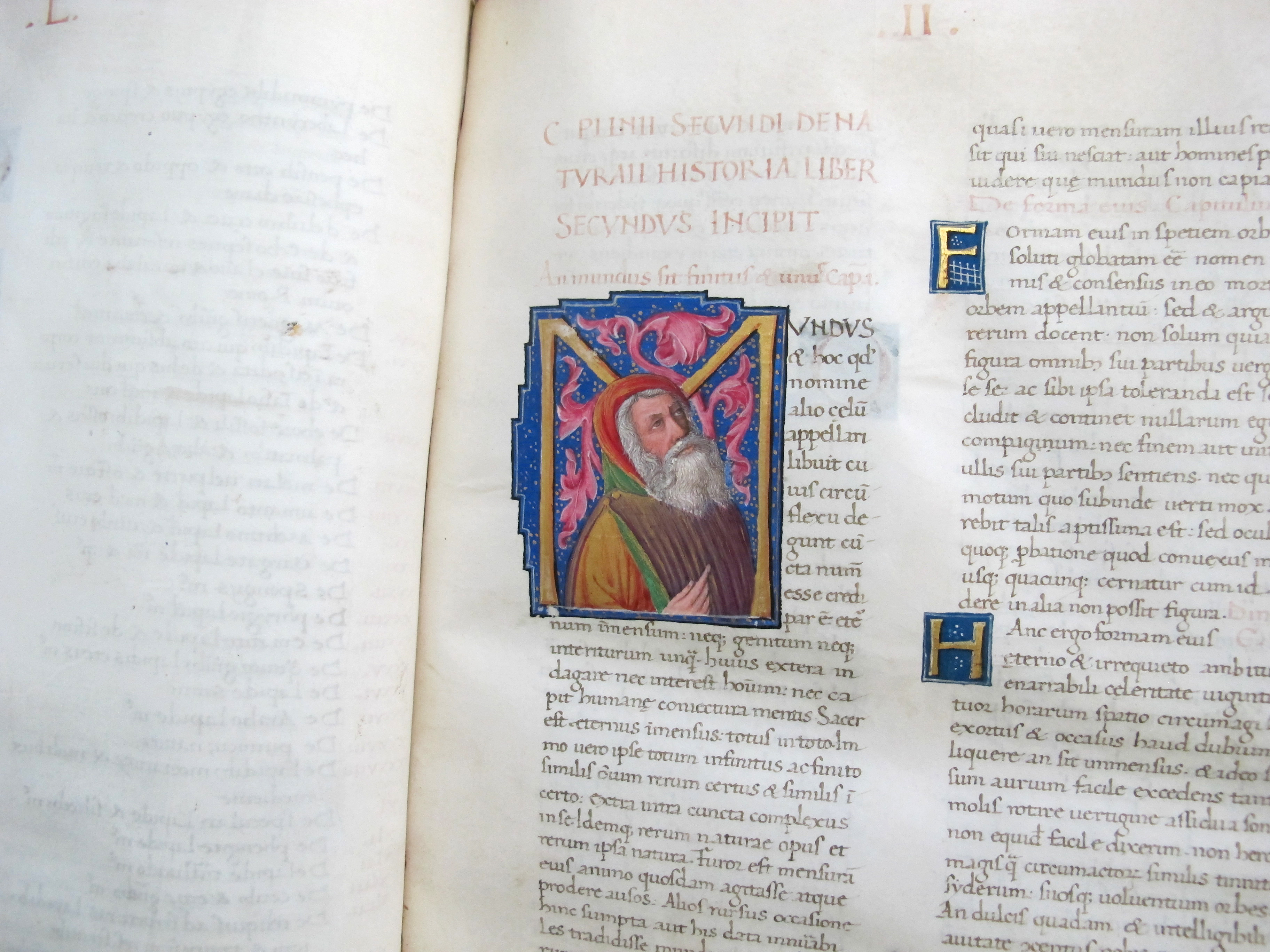 Biblioteca Malatestiana - MIBAC This is a photo of a monument which is part of cultural heritage of Italy.